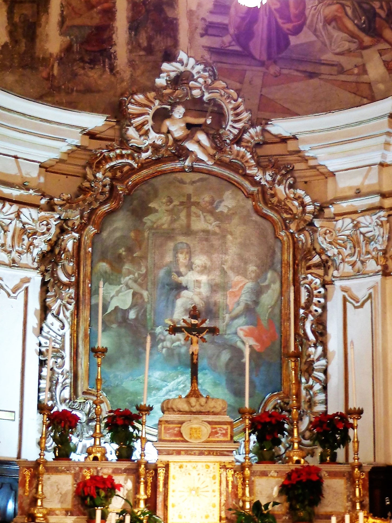 Pala d'altare, altare maggiore, foto già presente su account personale FB